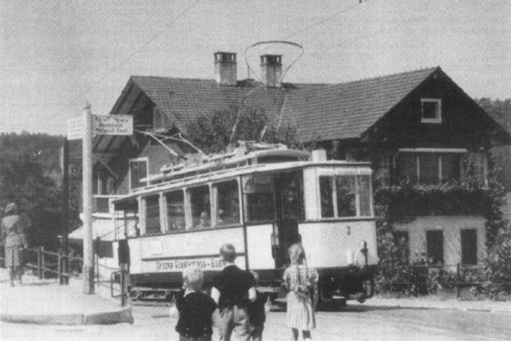 Historisches Bild des Motorwagen Ce 4/4 Nr. 3 der Spiezer Verbindungsbahn (SV).